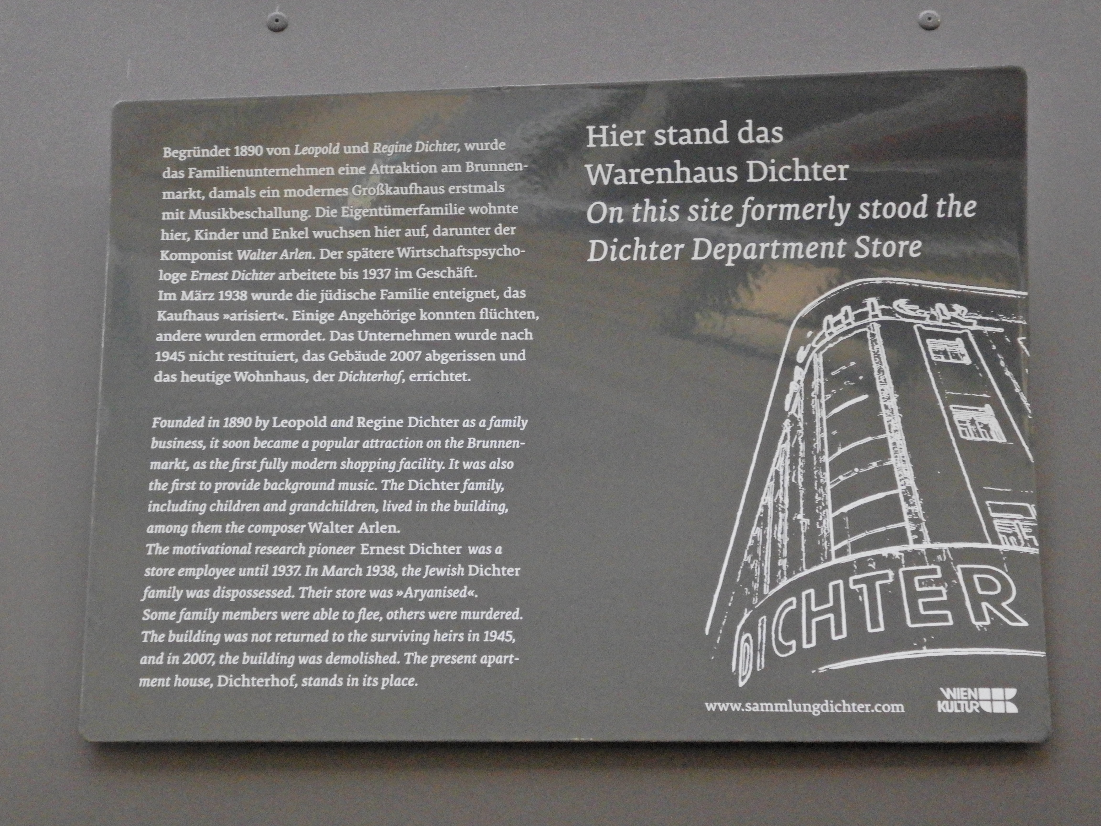 Gedenktafel für das Warenhaus Dichter (Wien, Brunnengasse 40)